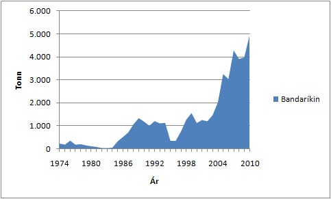 Heimsafli spámannskrabba frá árinu 1974-2010 samkvæmt FAO